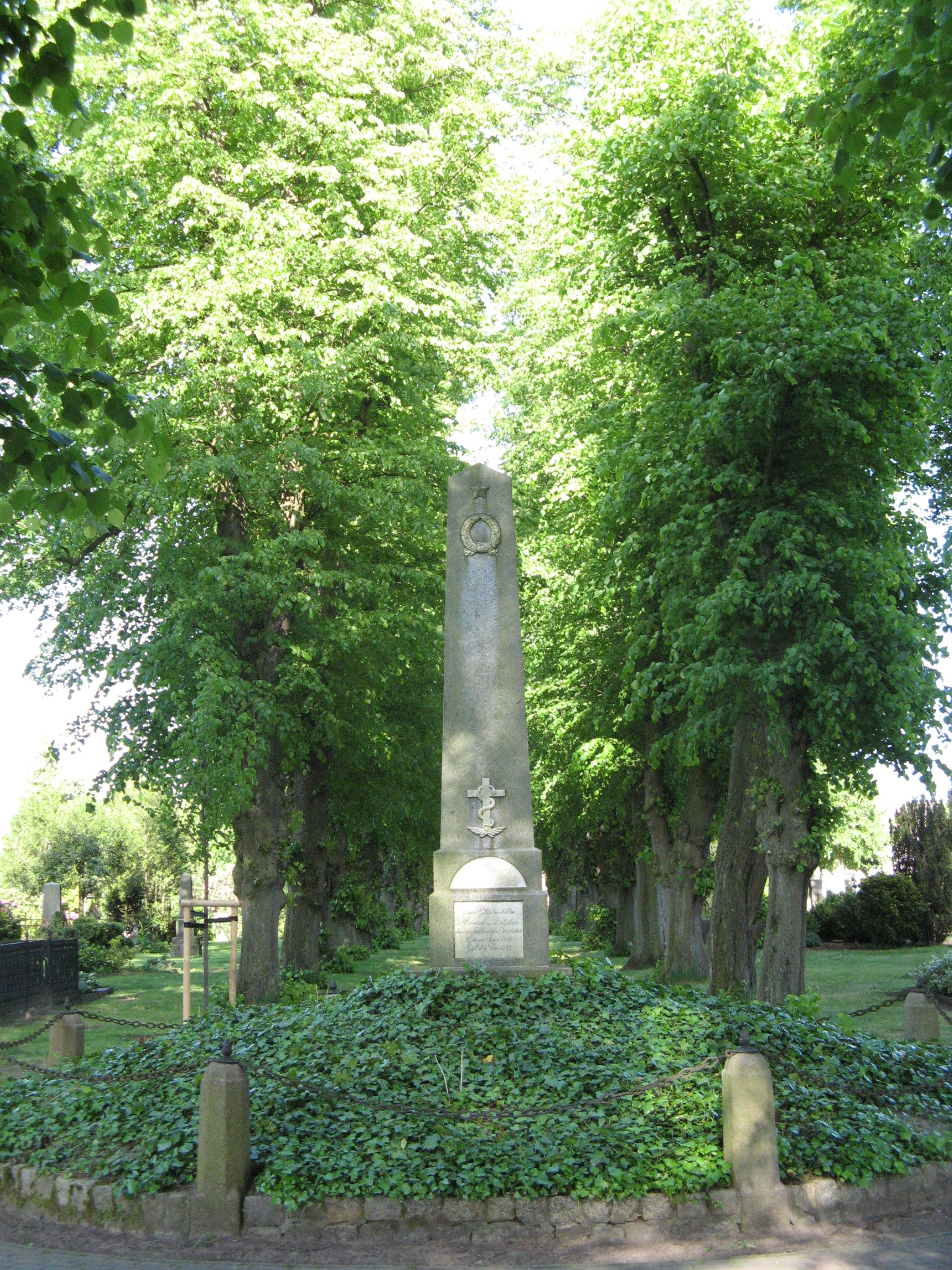 Heide, Zütphen-Gedenkstele auf Zütphen-Friedhof